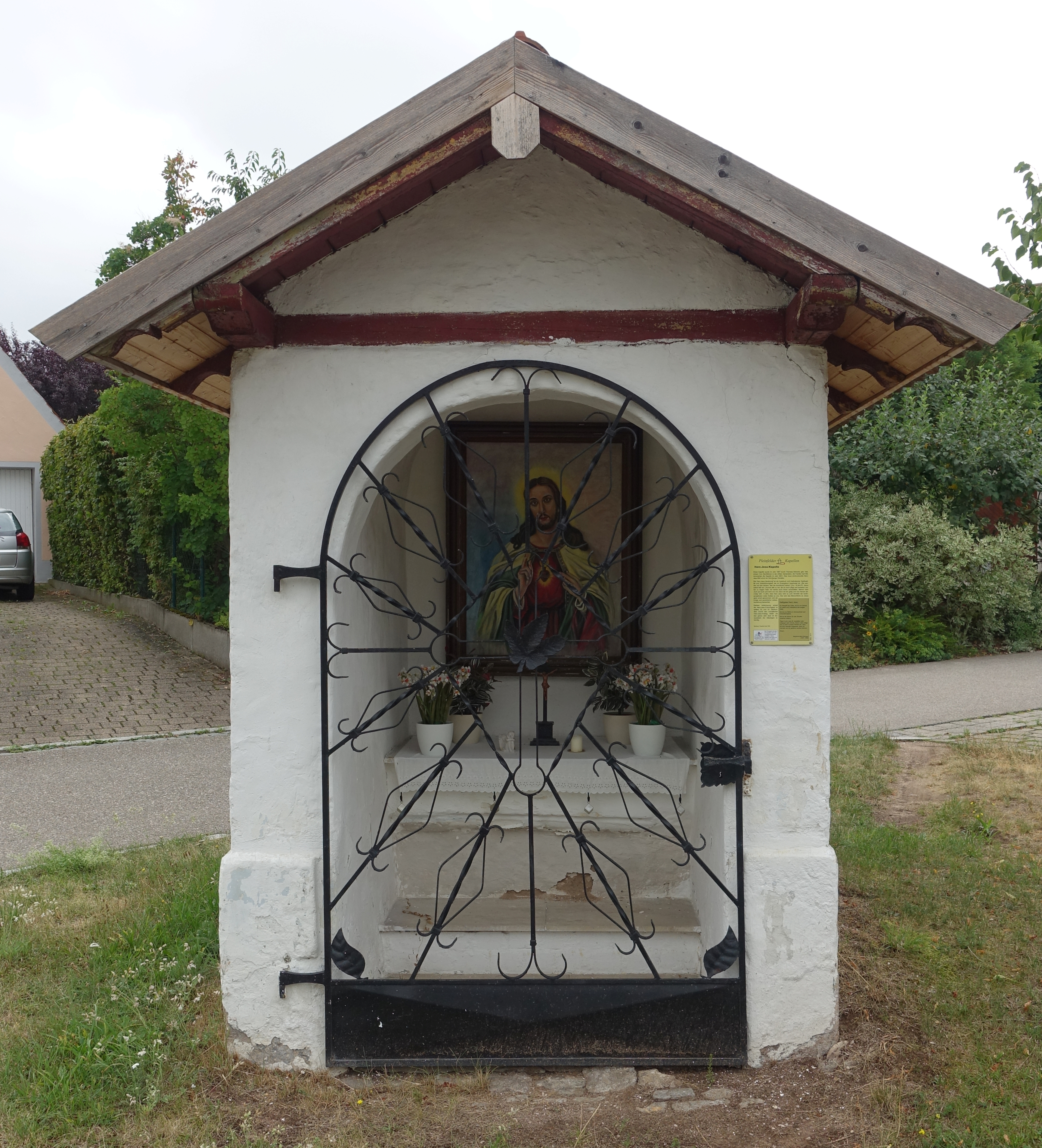 Wegkapelle an der Stirner Straße